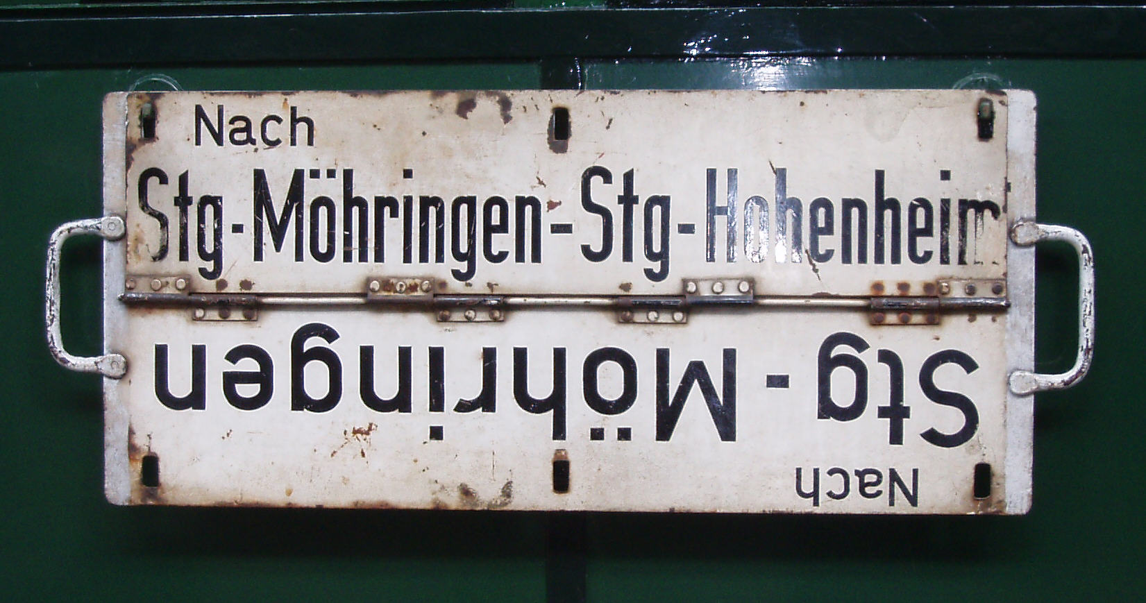 Stuttgarter Straßenbahnmuseum